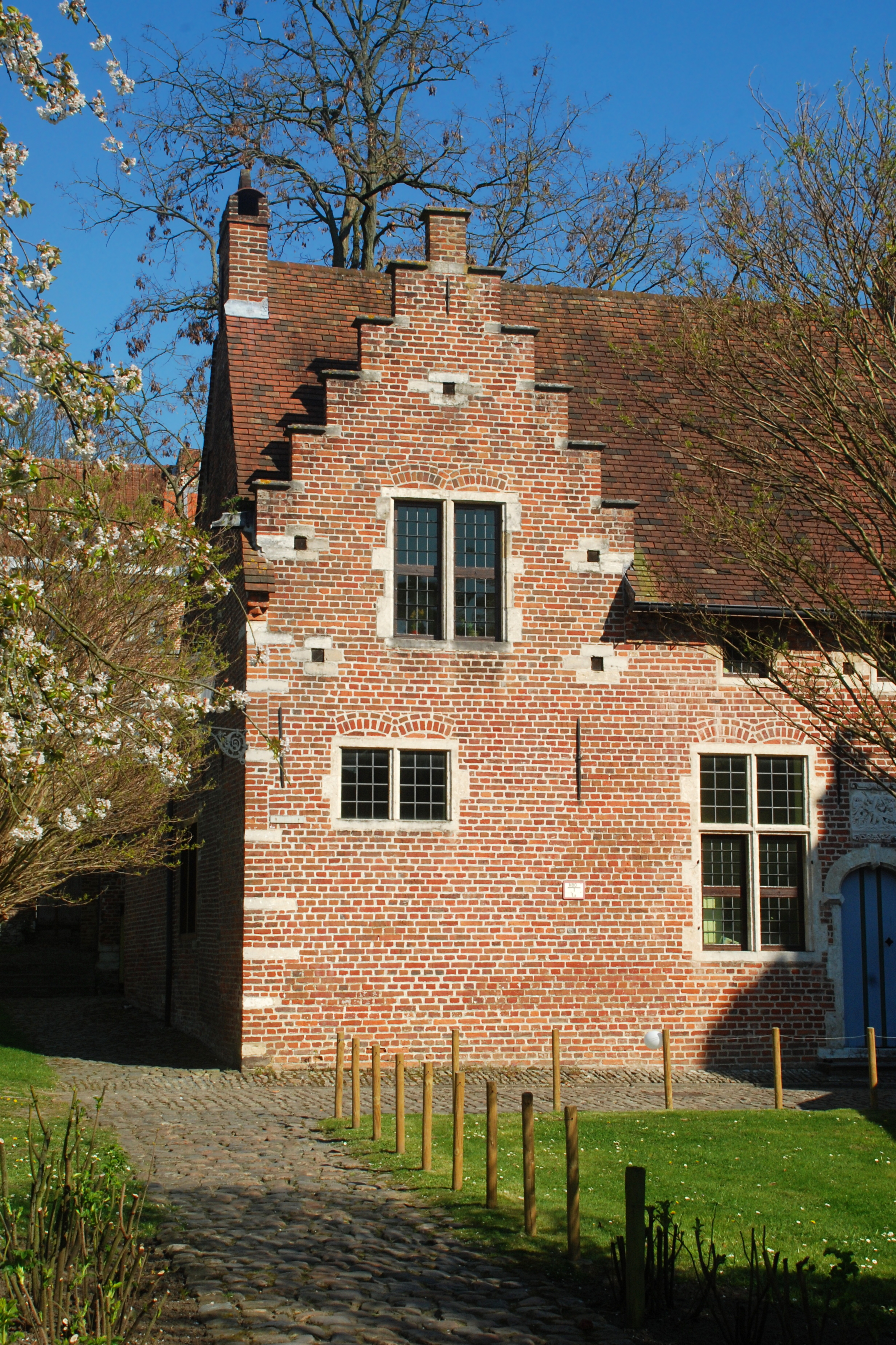 Belgium - Leuven - Groot Begijnhof - Bovenstraat n° 85